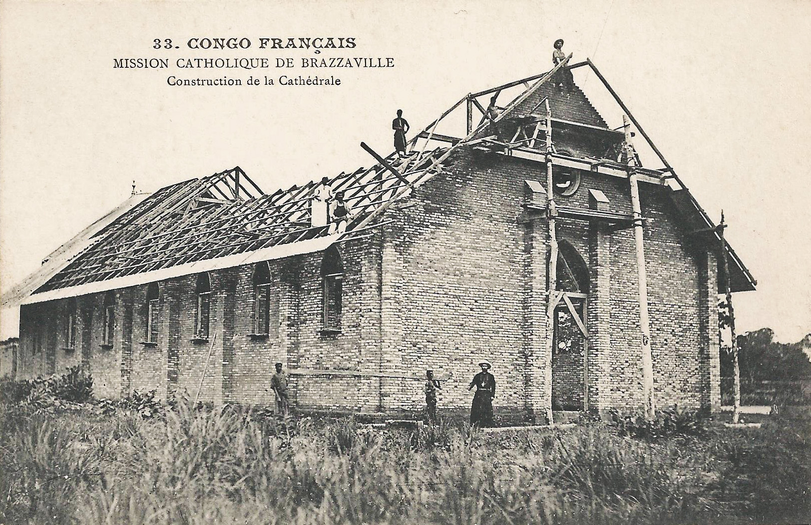 Mission catholique de Brazzaville. Construction de la cathédrale. pas de mention d'auteur, d'éditeur ou de date publié en 1907 par la Société de Géographie [1])